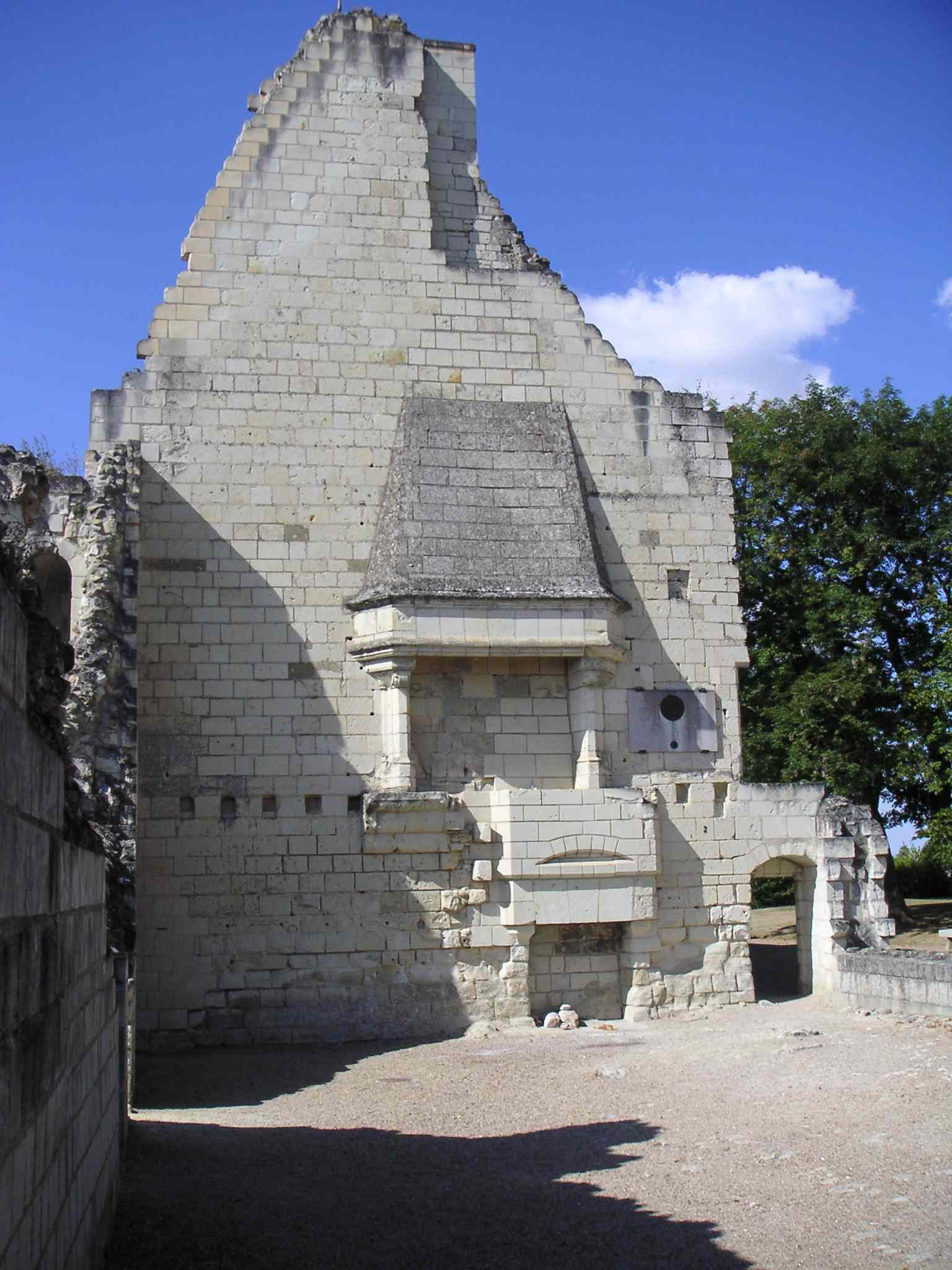 La grande salle des logis royaux du château de Chinon